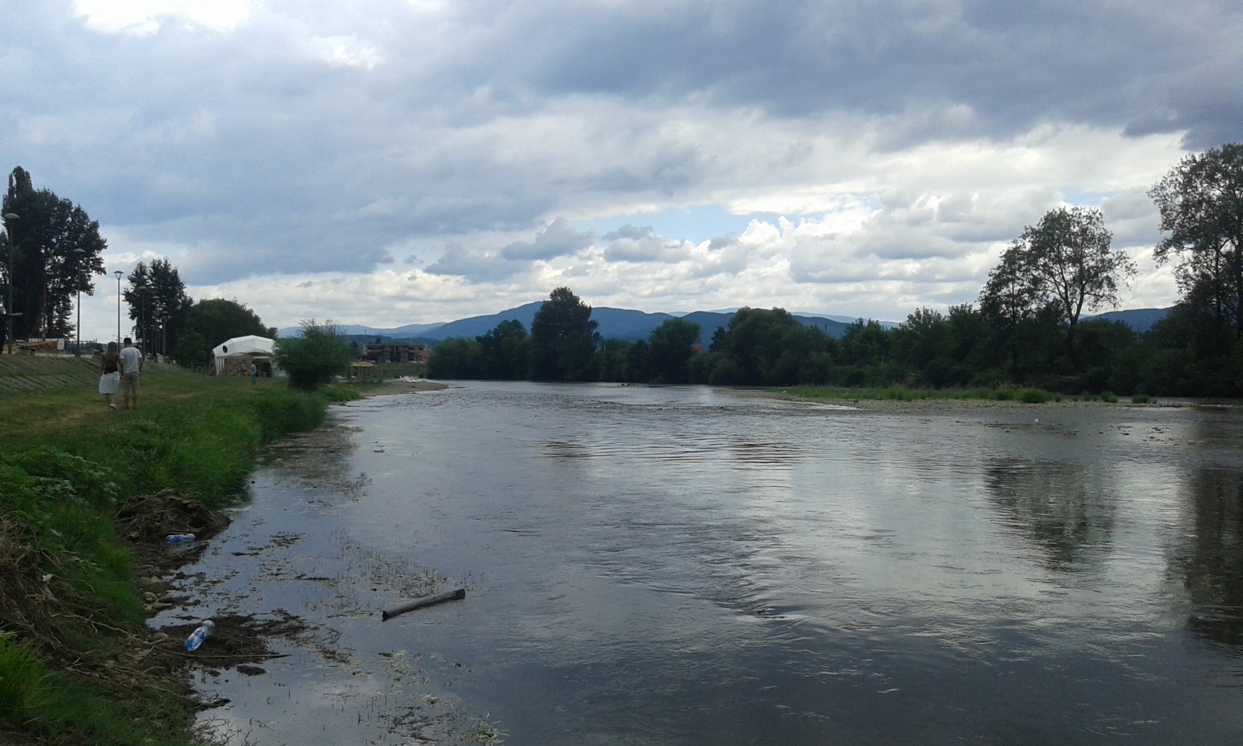 Reka Ibar Kraljevo